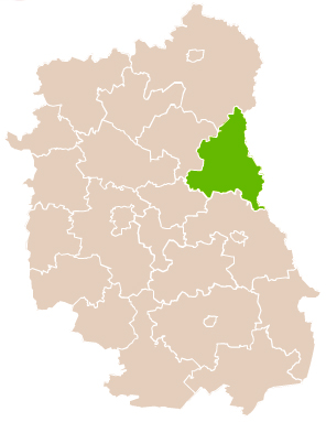 Map of Włodawa county, Lublin voivodship Mapa powiatu włodawskiego, województwo lubelskie